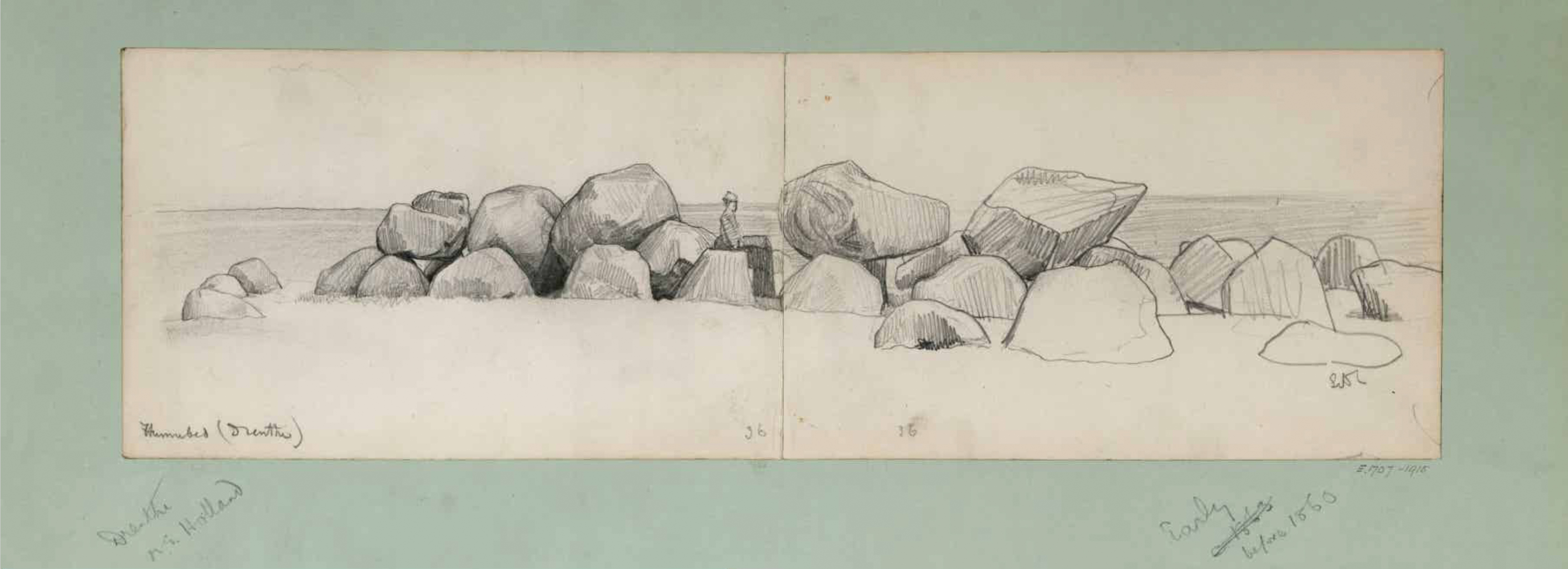 Lawrence Alma-Tadema tekent hunebed D14-Eexterhalte (Dr.)